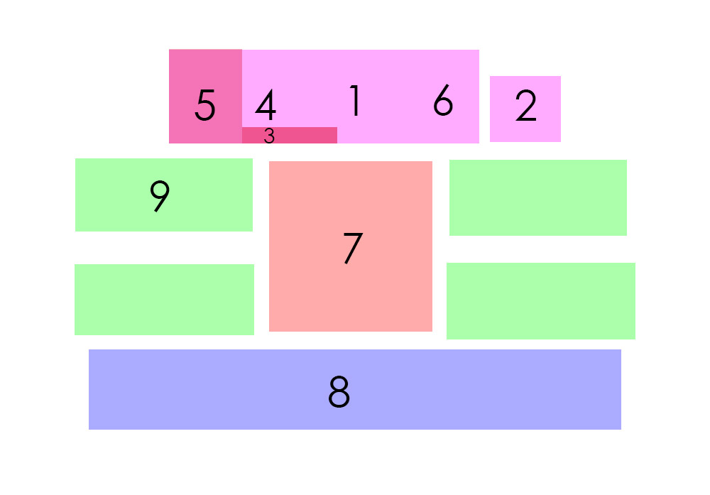 Esquema del plano de la candelaria.